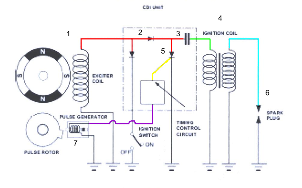 Schémas électrique du circuit d'un système d'allumage CDI